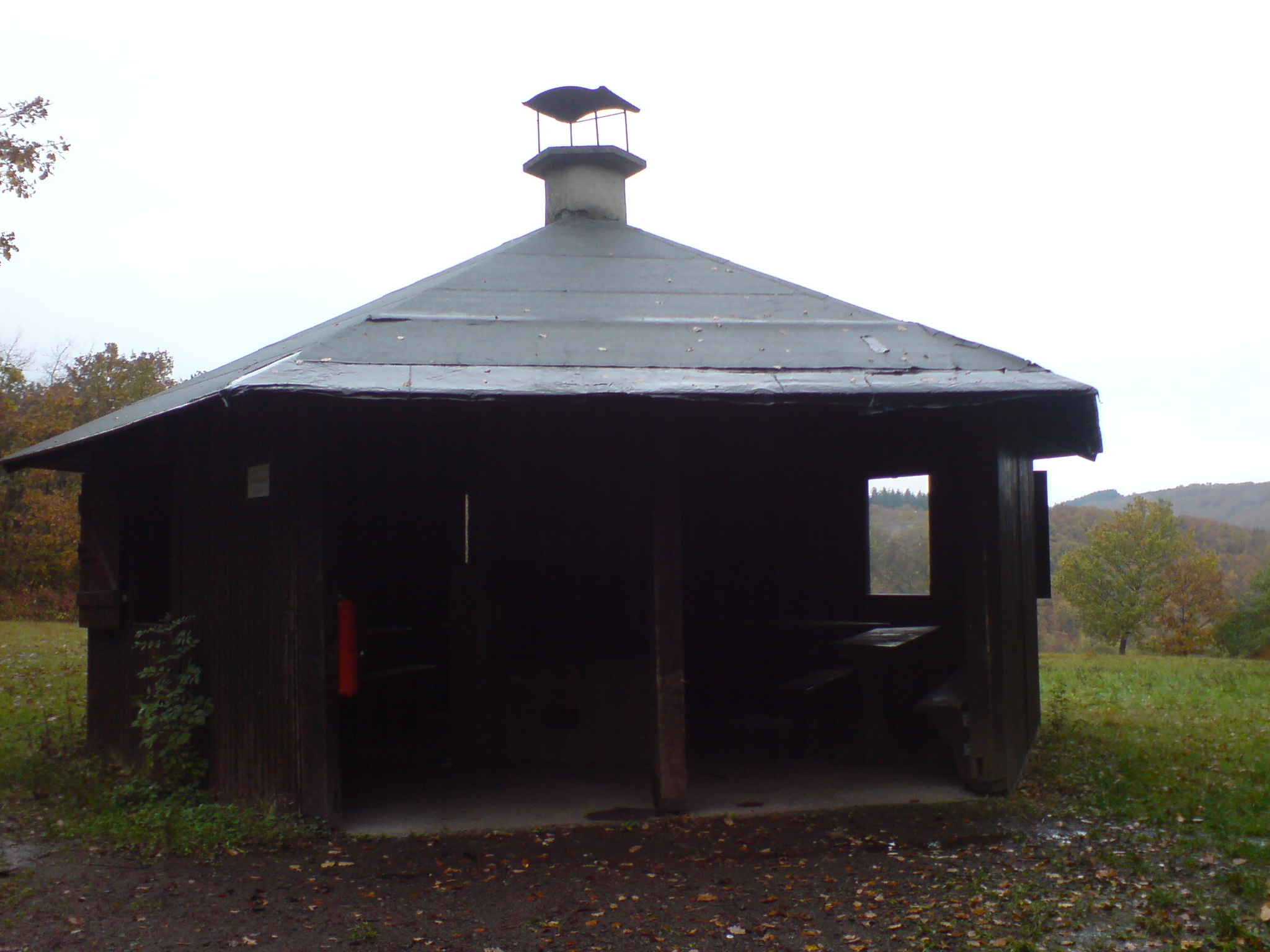 Die Breitenheimer Hütte bei Breitenheim.